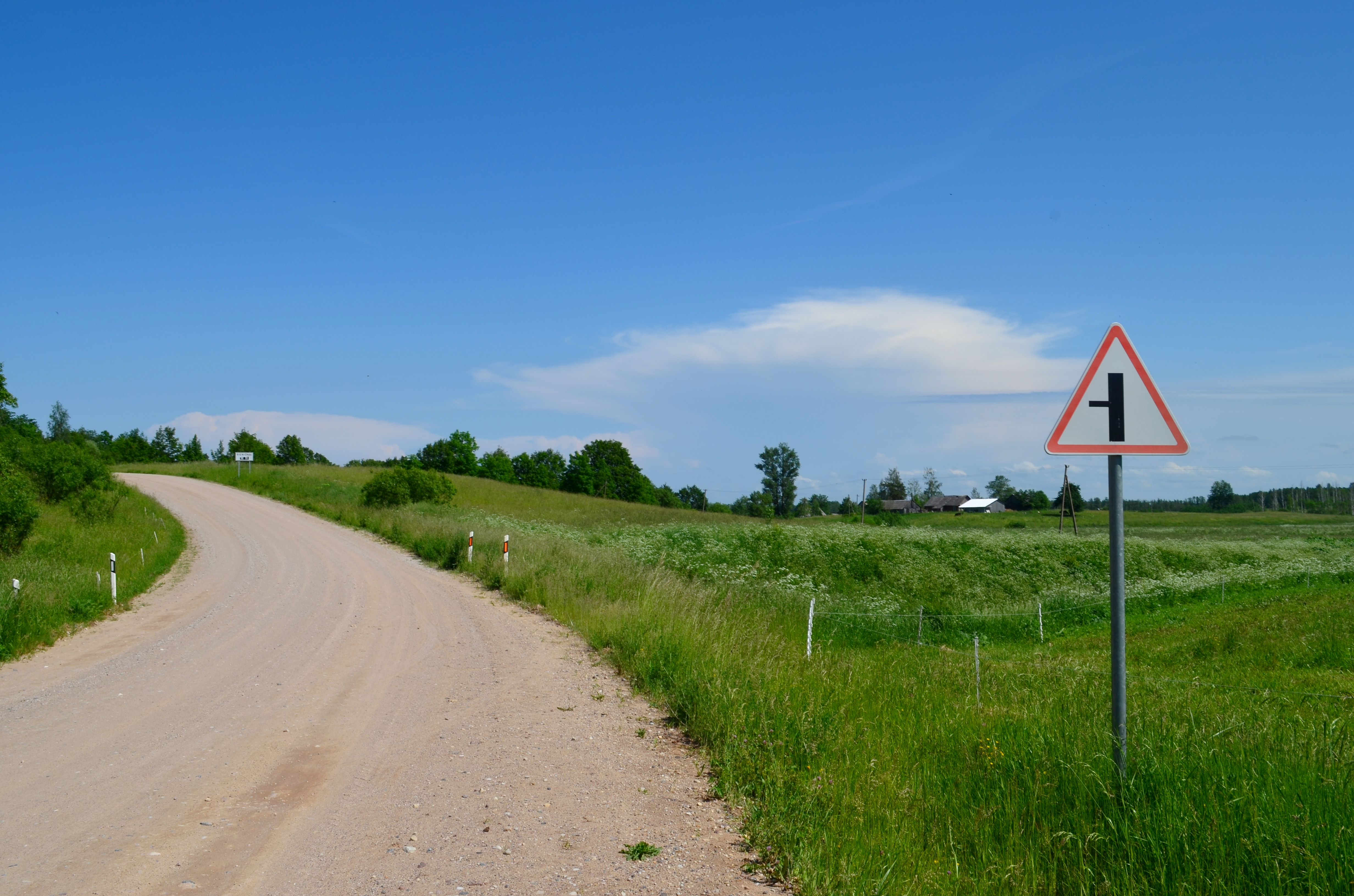 Bieniūnai, Ignalinos r.